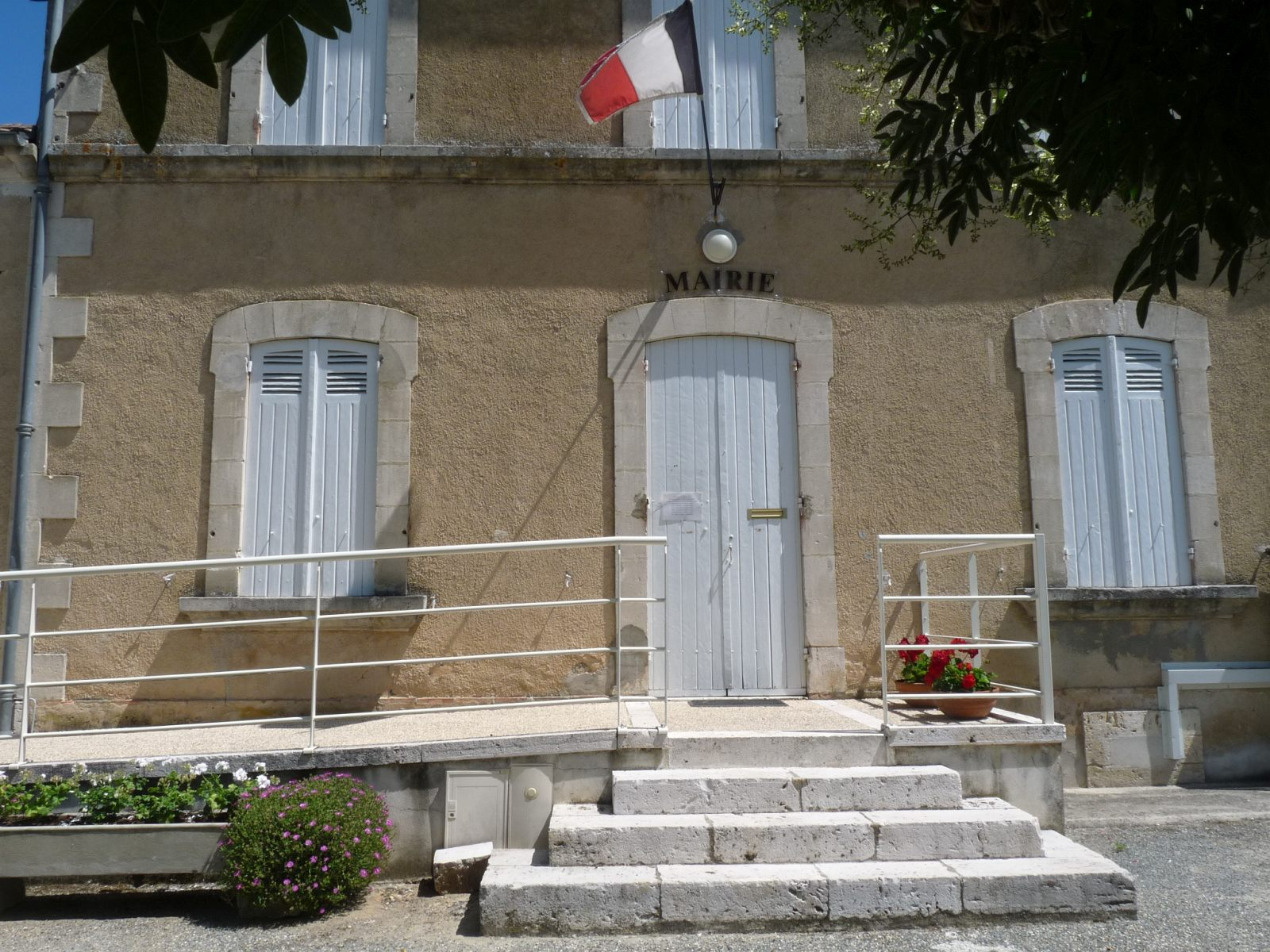 Mairie de Caubeyres, Lot-et-Garonne, France